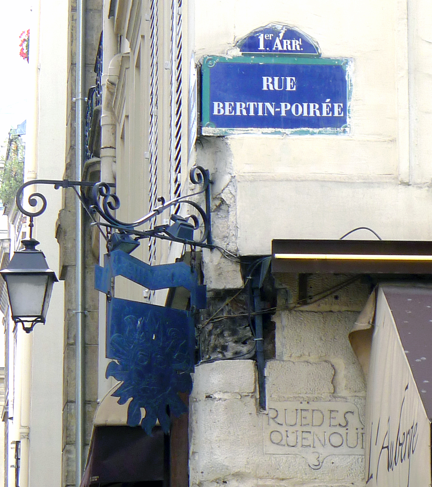 Rue Bertin-Poirée (plaque actuelle et ancienne inscription du nom de la rue) - Paris Ier